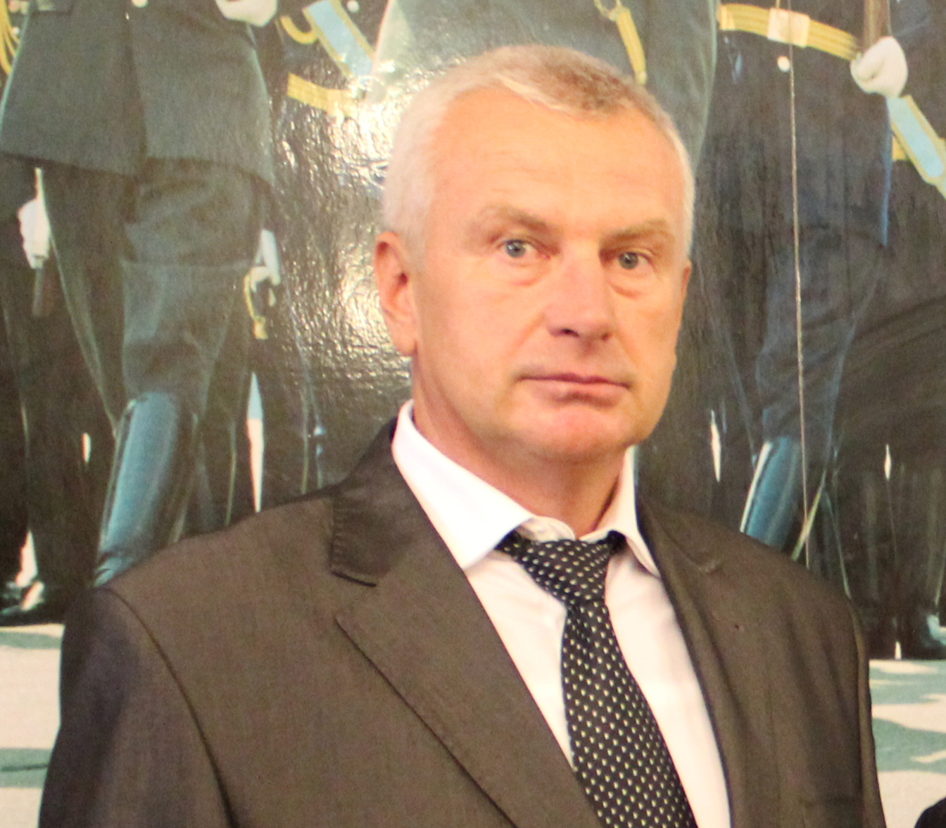 Изобретатель генетического жетона